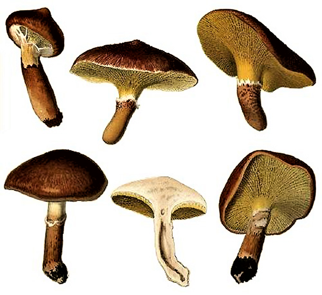 Boletinus cavipes Schulzer 1873, heute Suillus cavipes